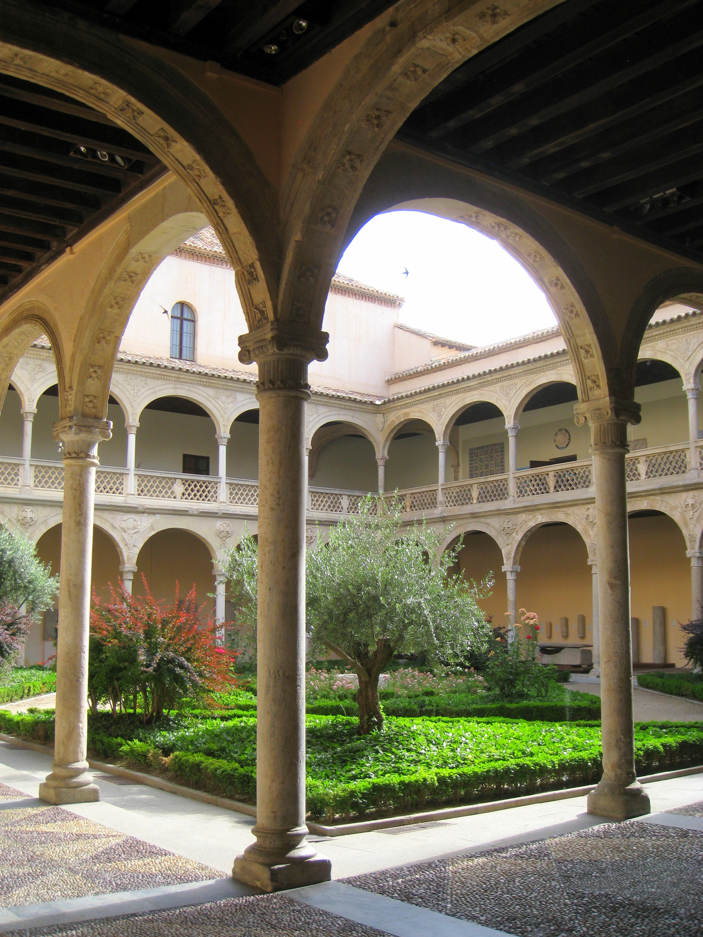 Museo de Santa Cruz, Toledo, Spain.